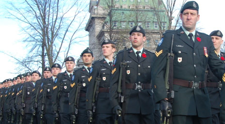 Voltigeurs de Québec